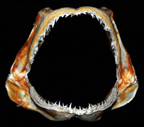 Sphyrna tudes